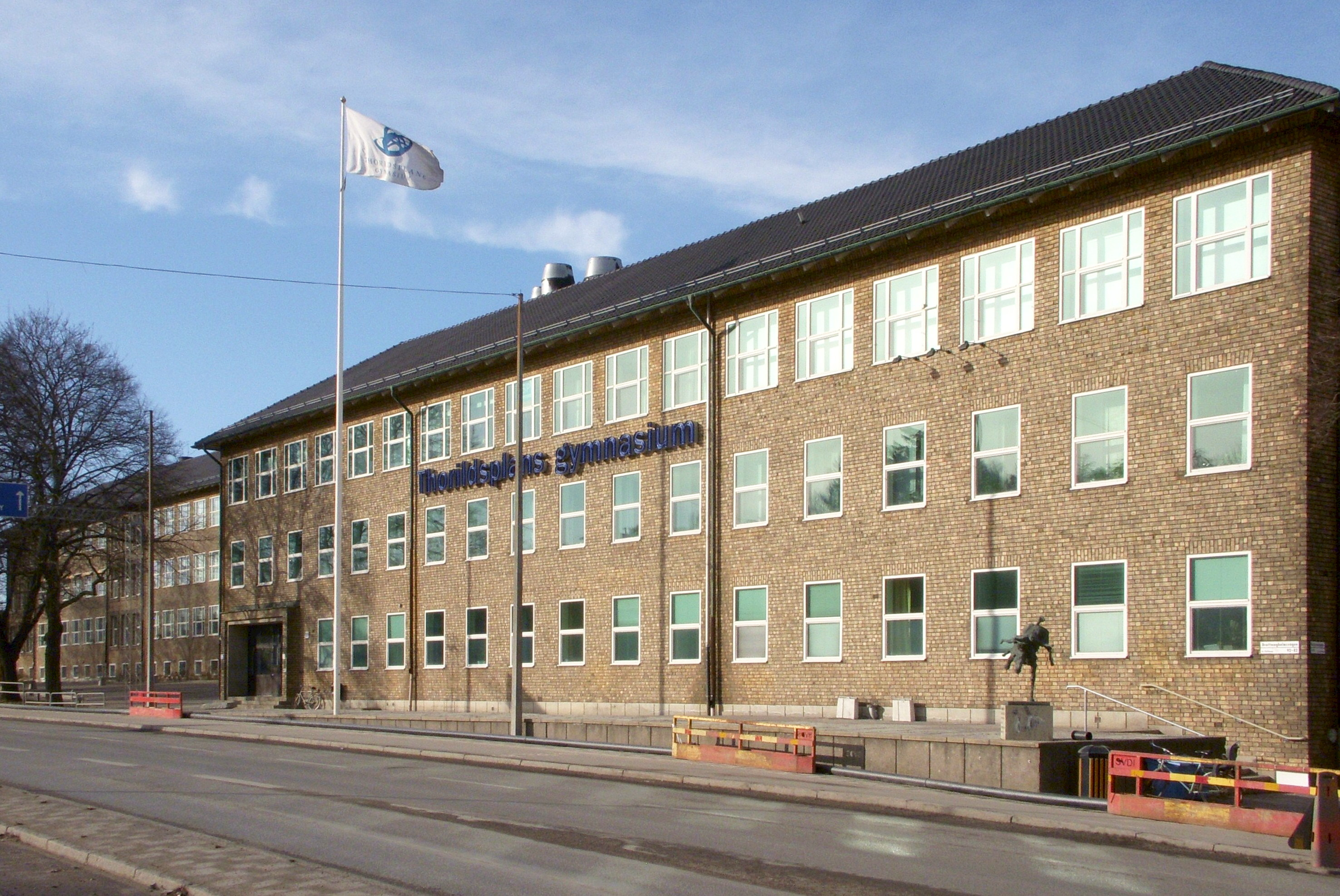 Thorildsplans gymnasium, Stockholm i mars 2012